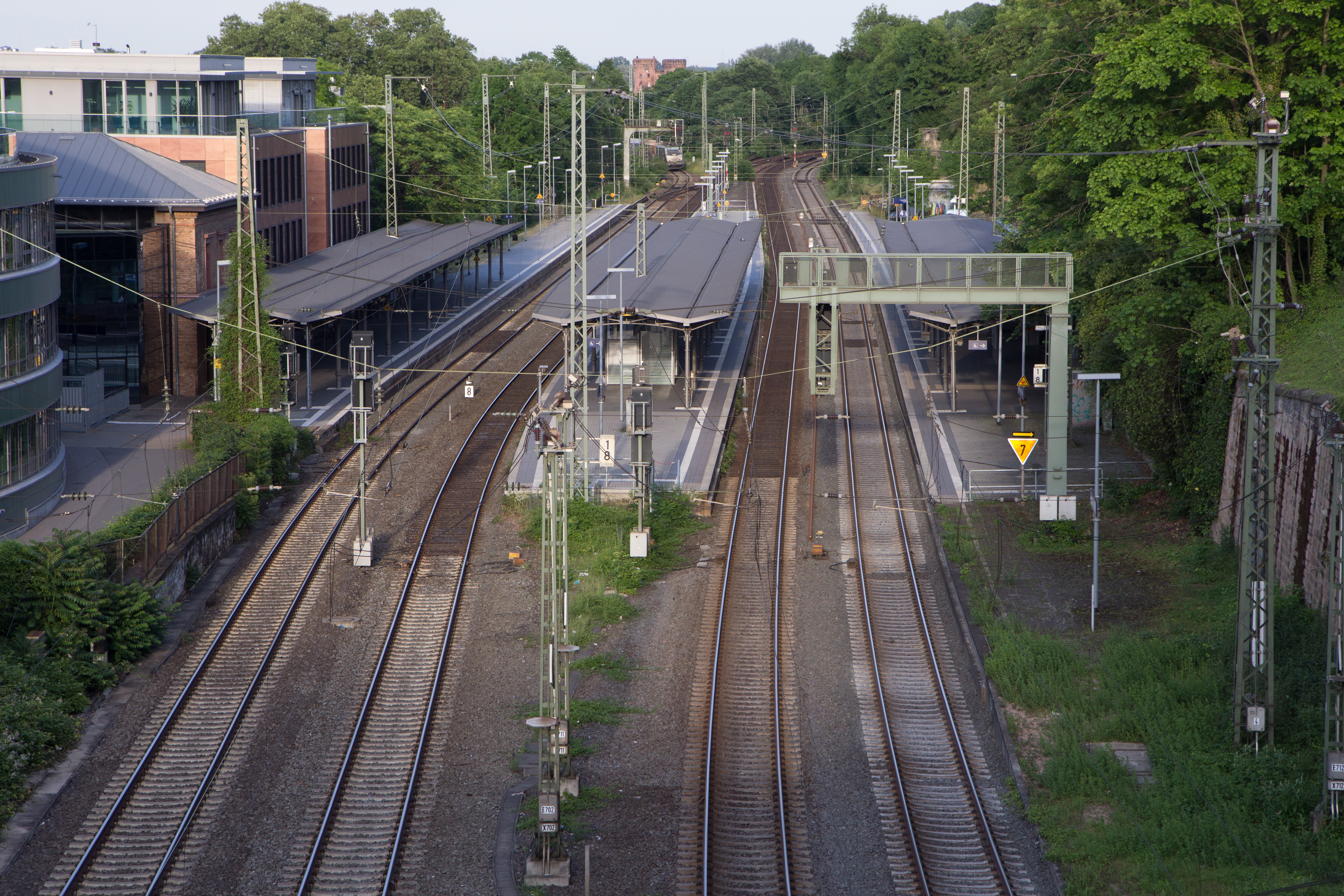 Bahnhof Mainz Römisches Theater